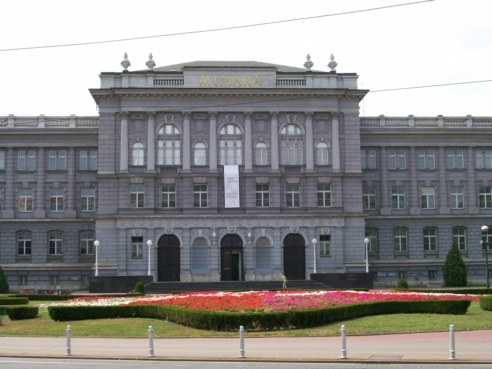 Muzej Mimara, Zagreb